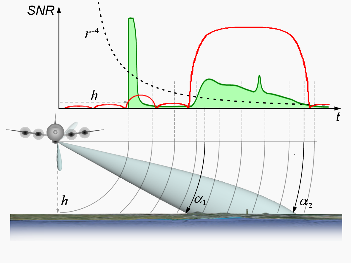 Leistungsverhältnisse in den Echosignalen eines SLAR (grün) in Abhängigkeit des Antennendiagramms (rot) und der Zweiwegdänpfung (gestrichelt)